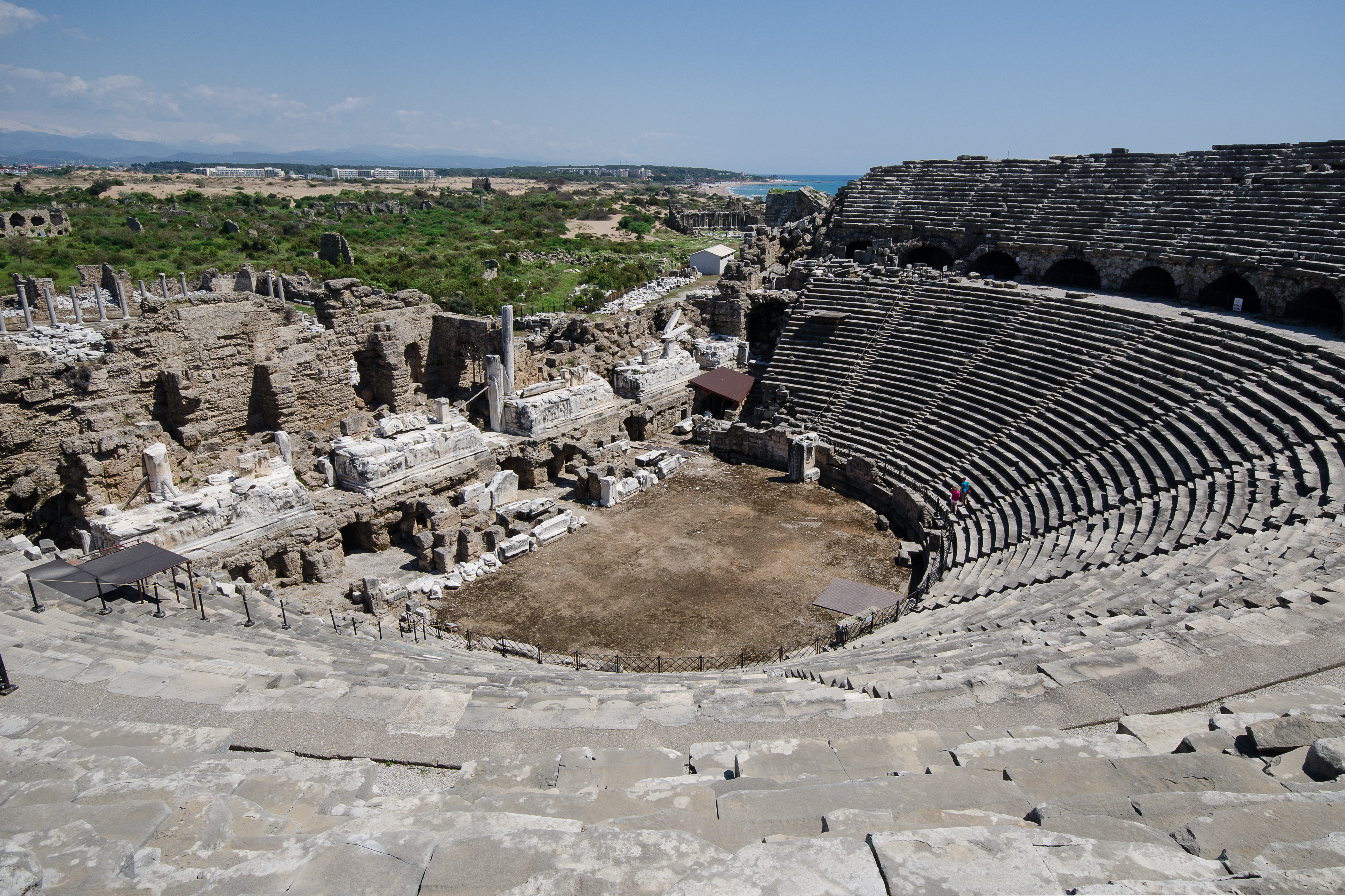 Auf dem Bühnengebäuse liegen die Marmorblöcke des abgemeißelten Dionysos-Frieses. Im Hintergrund die Dünenzone, die nicht nur die Nekropole überdeckt, sondern auch den östlichen Teil der Stadt.